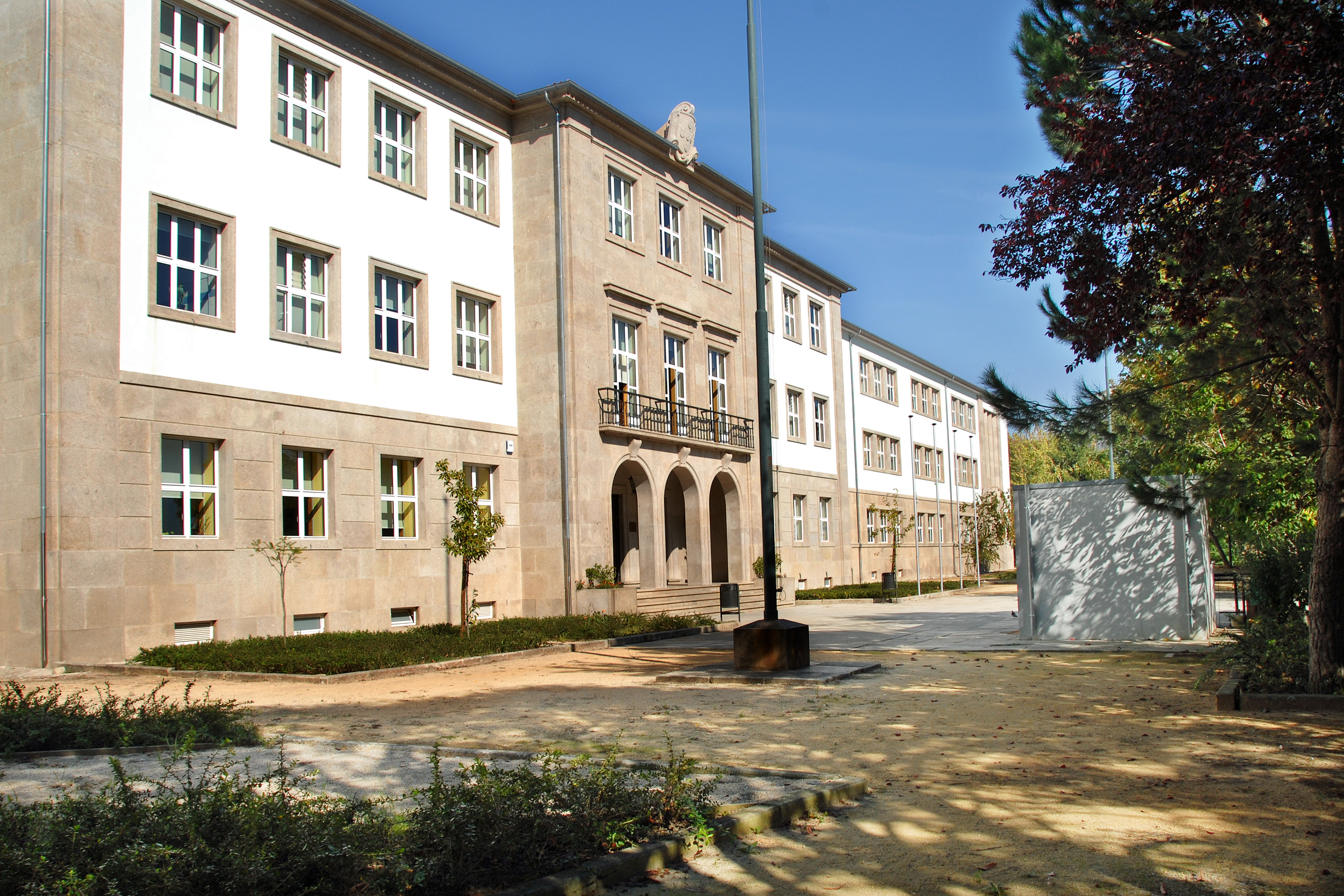 Escola Secundária Carolina Michaelis This file was uploaded for Wiki Loves Monuments in Portugal with the unique identifier 10949521.